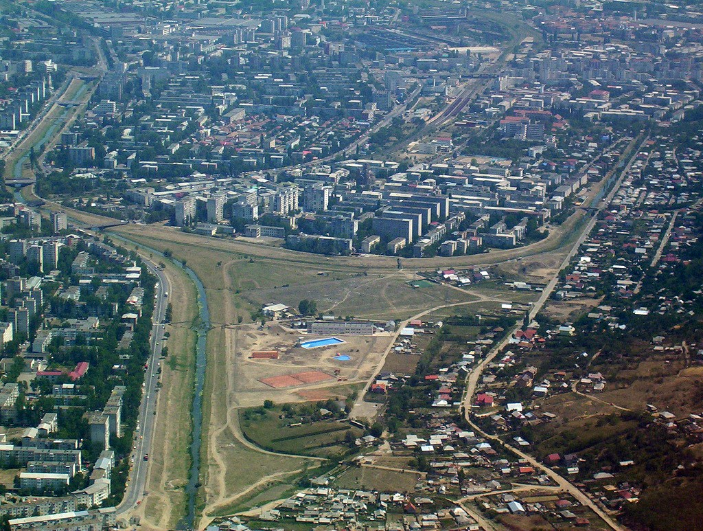 Cartierul Mircea cel Bătrân în plan îndepărtat; cartierul Alexandru cel Bun în partea stângă a imaginii, în stânga râului Bahlui